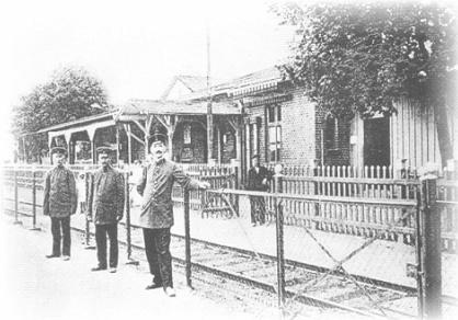 Pierwszy dworzec kolejowy w Gdyni, zdjęcie z około 1900 roku.